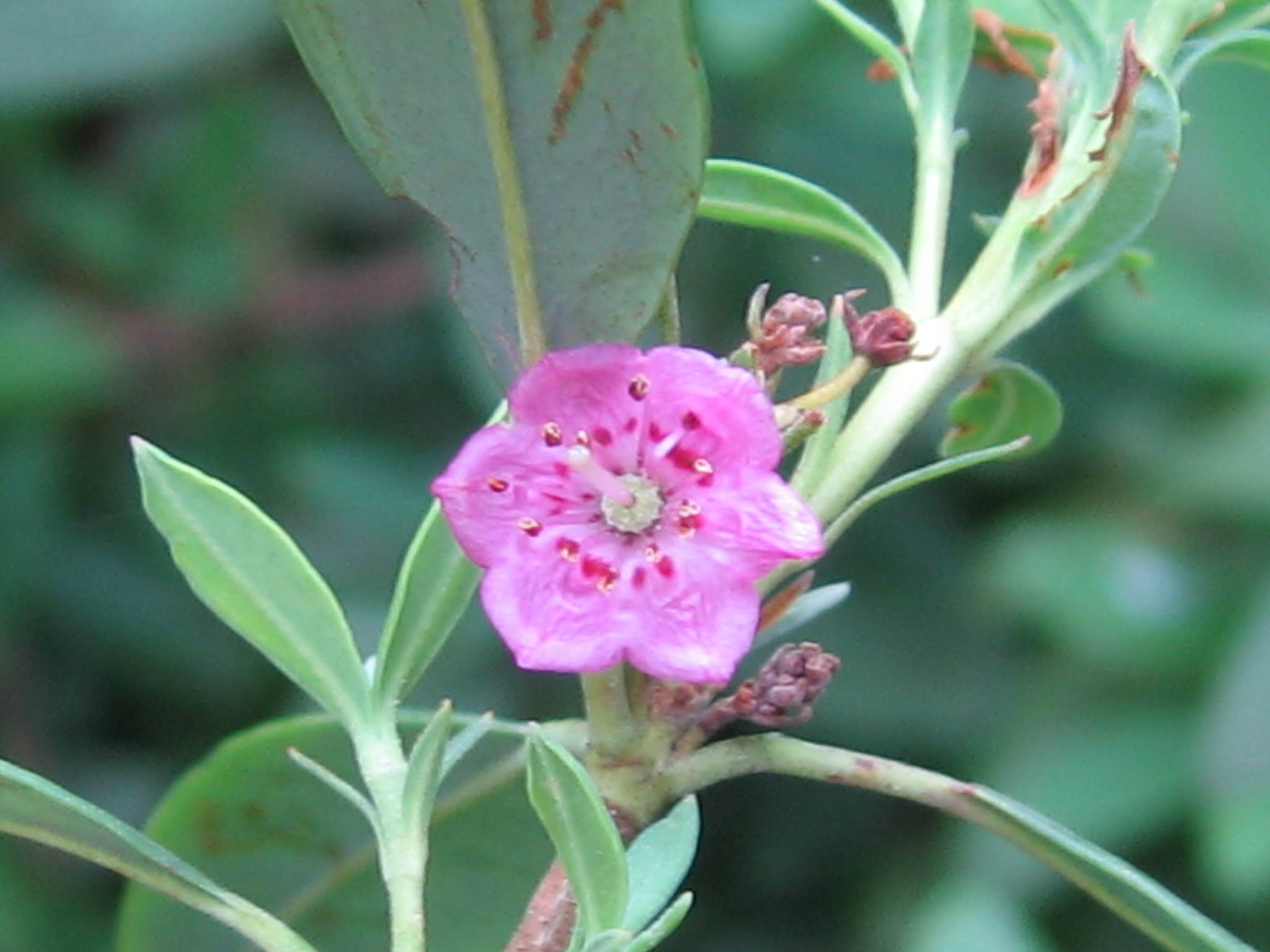 Blüte einer Kalmia angustifolia im Kolshorner Moor (gelegen im Landschaftsschutzgebiet „Altwarmbüchener Moor/Ahltener Wald“)